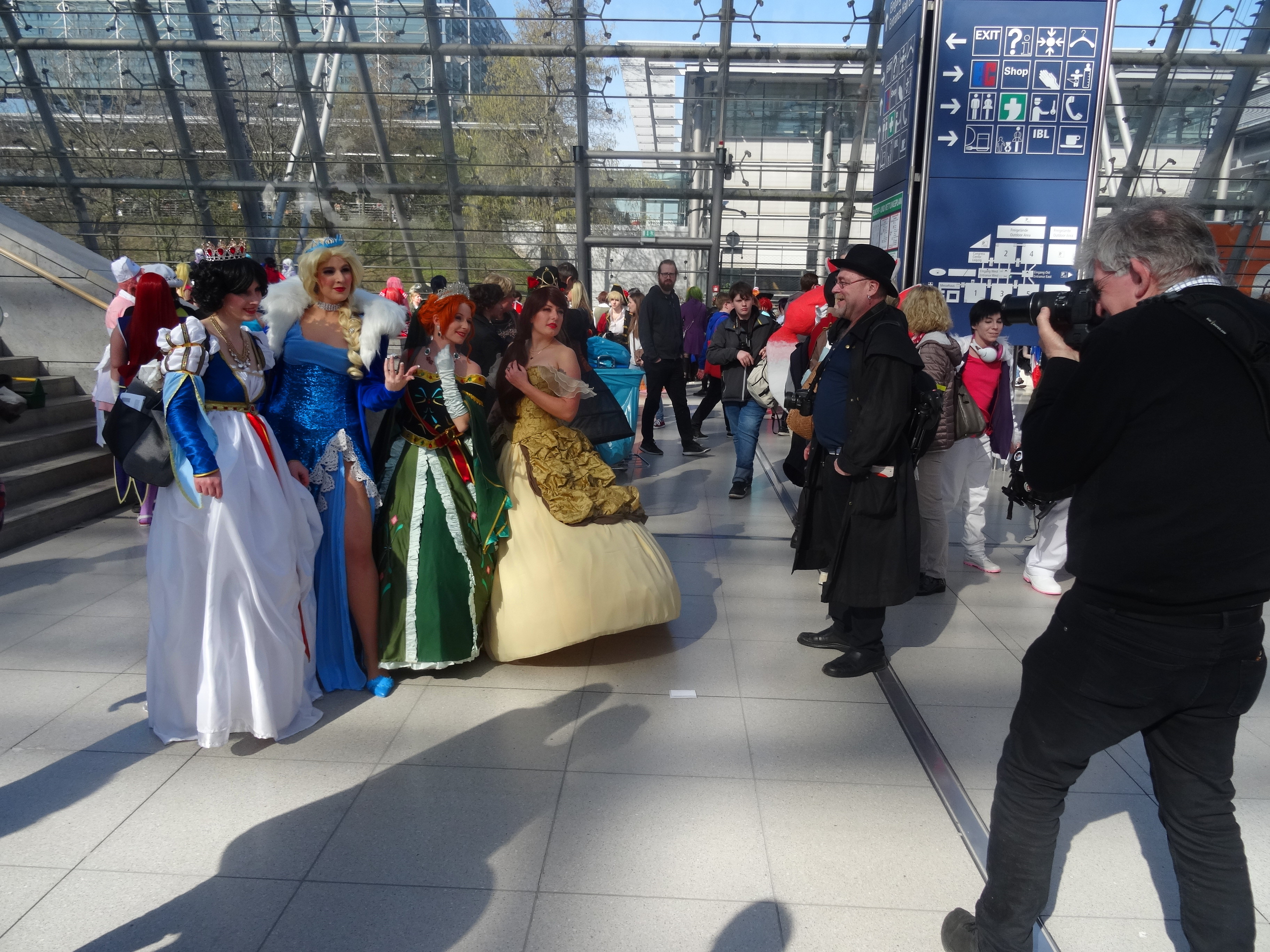 Cosplayer auf der Buchmesse in Leipzig 2017. Sie zeigen sich gerne und lassen sich fotografieren.